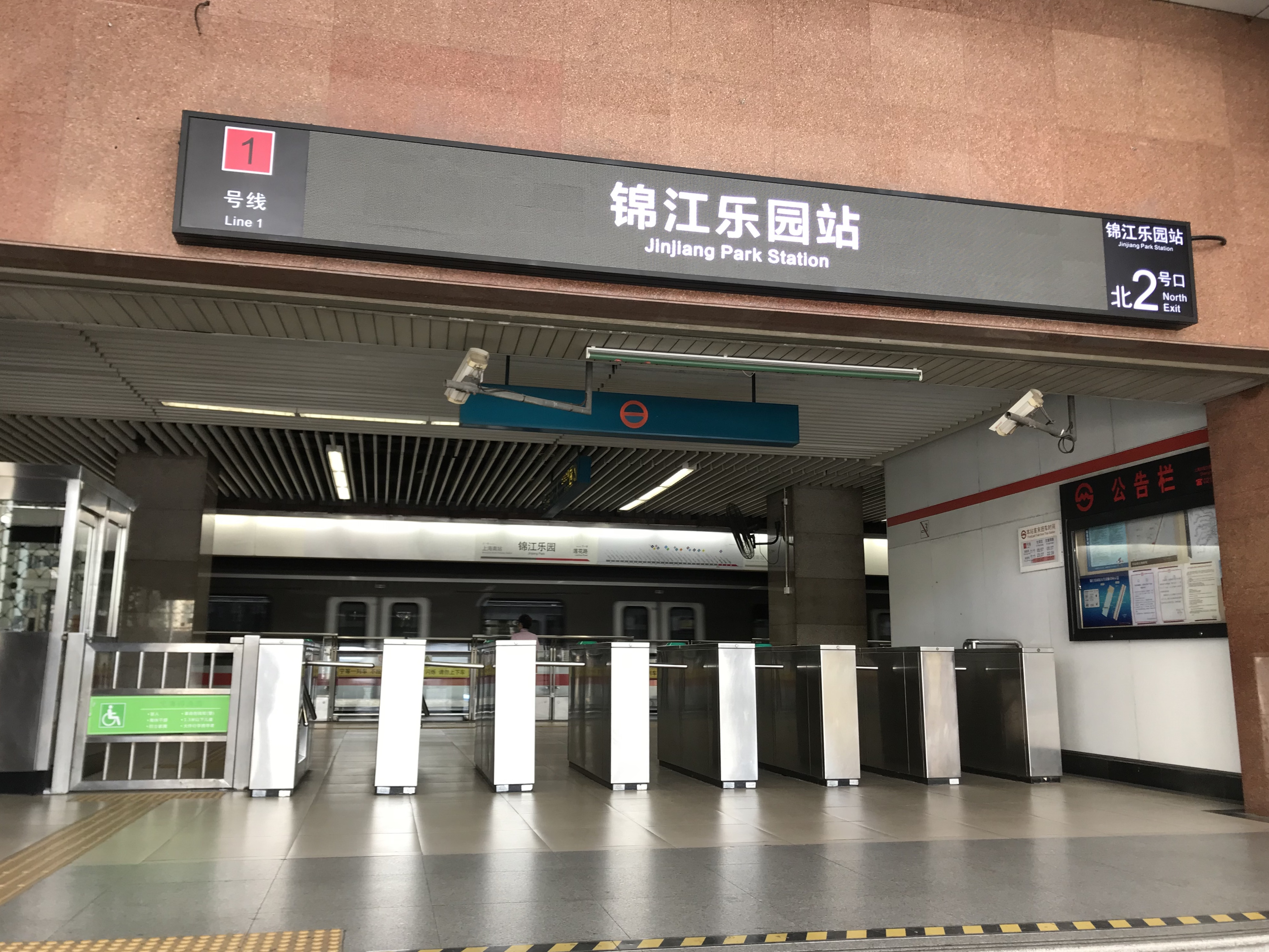 錦江楽園駅の北2番出入り口